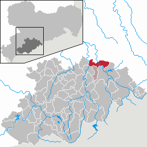 Grünhainichen im Erzgebirgskreis, Sachsen